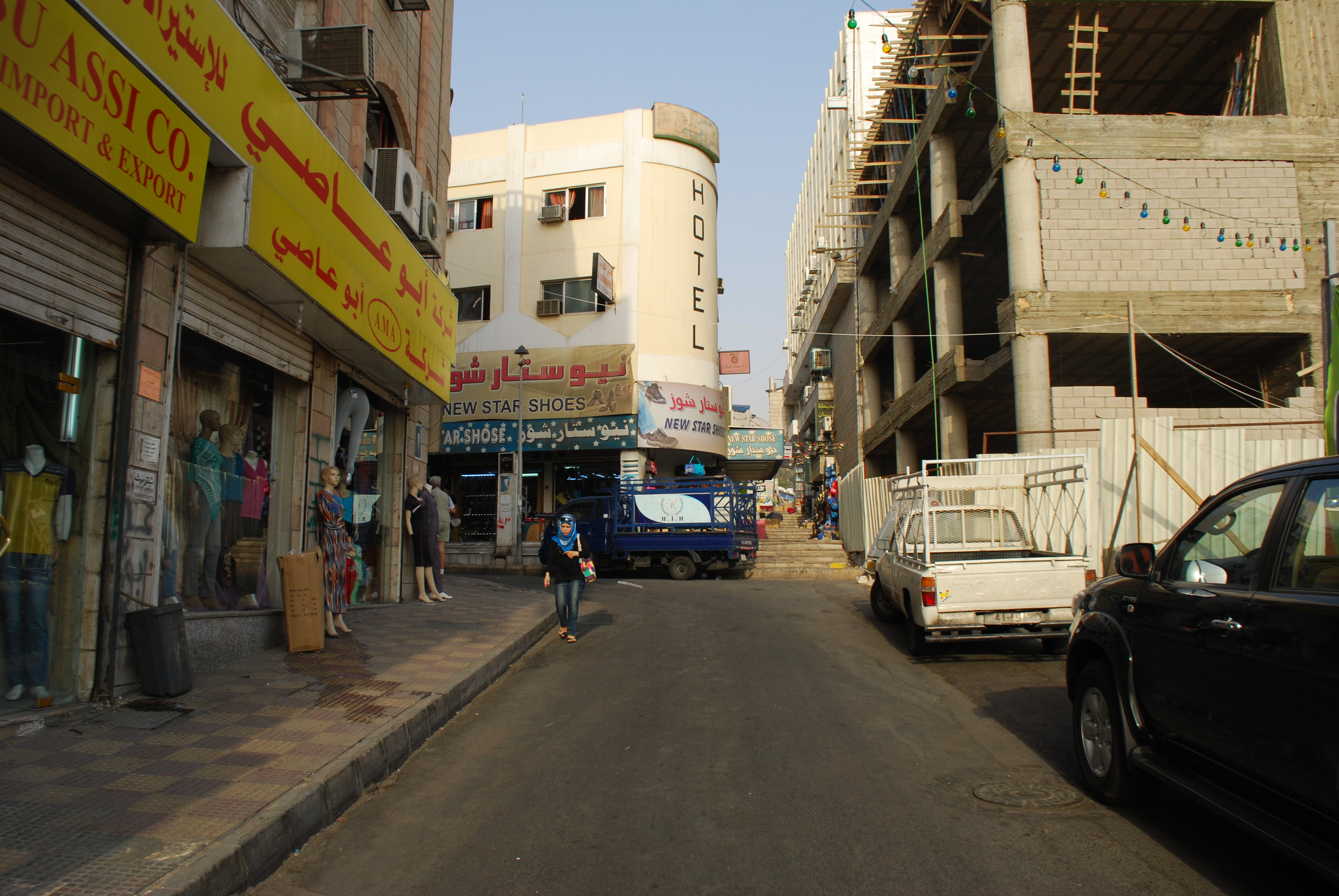 Aqaba : rue commerçante à proximité du boulevard côtier.